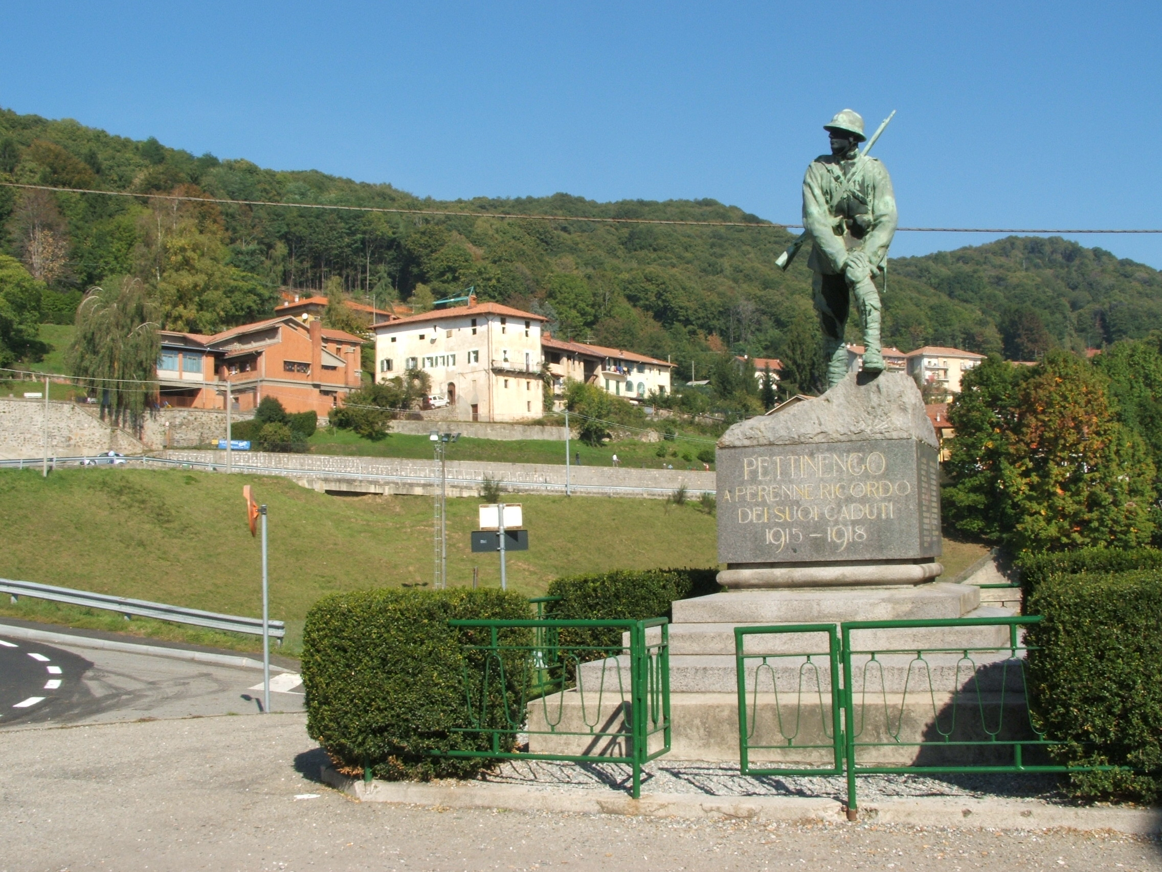 Pettinengo (provincia di Biella, Piemonte, Italia) Monumento ai caduti della prima guerra mondiale